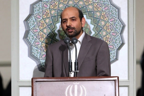 سخنرانی دکتر شهاب اسفندیاری ریاست دانشگاه صدا و سیما در حضور رهبر معظم انقلاب اسلامی سال 1397